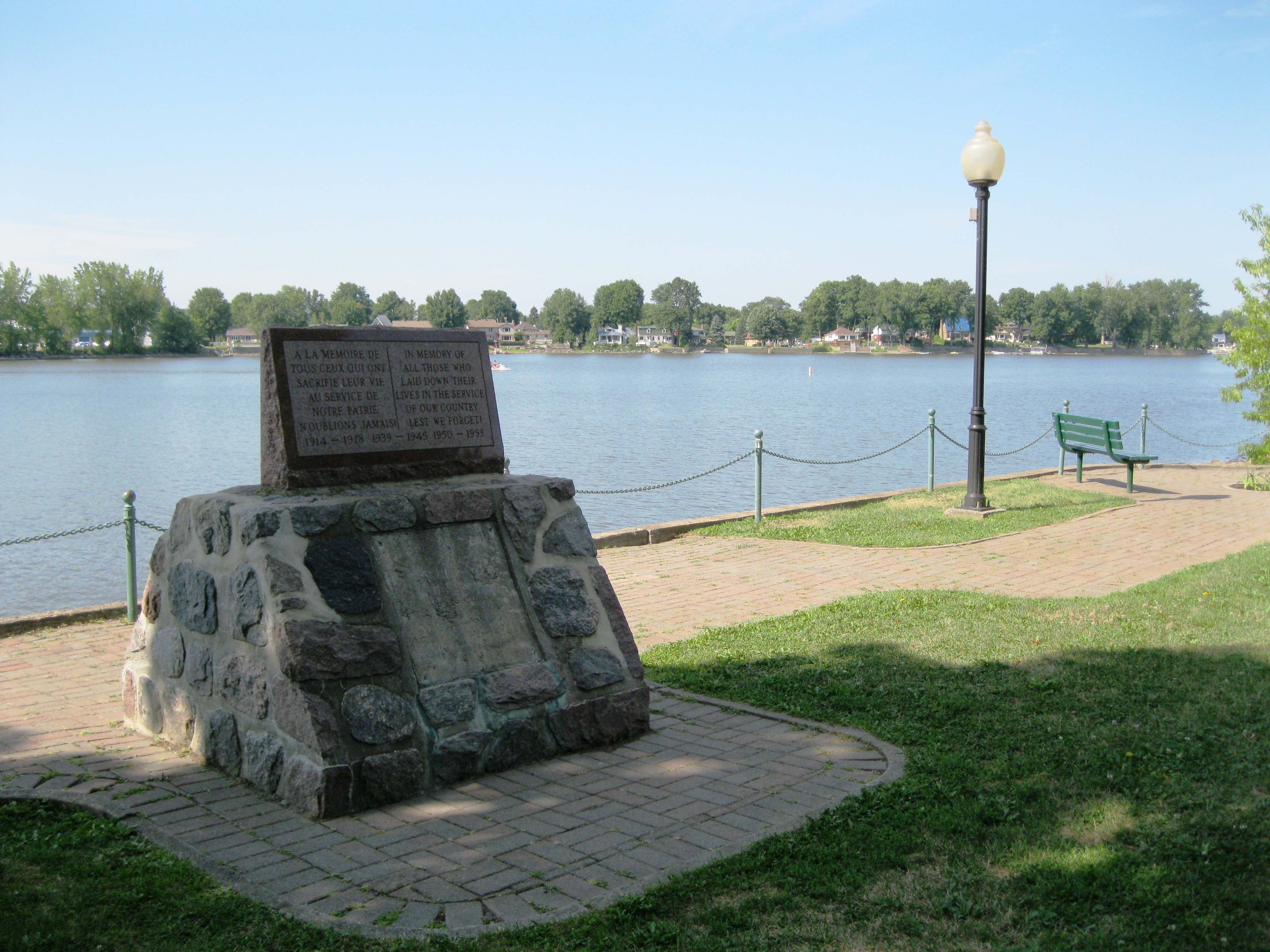 Cénotaphe du parc Kelso, Sainte-Anne-de-Bellevue